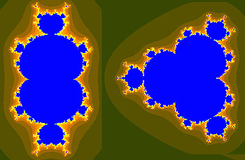 Mandelbrot set for n=3 and n=4